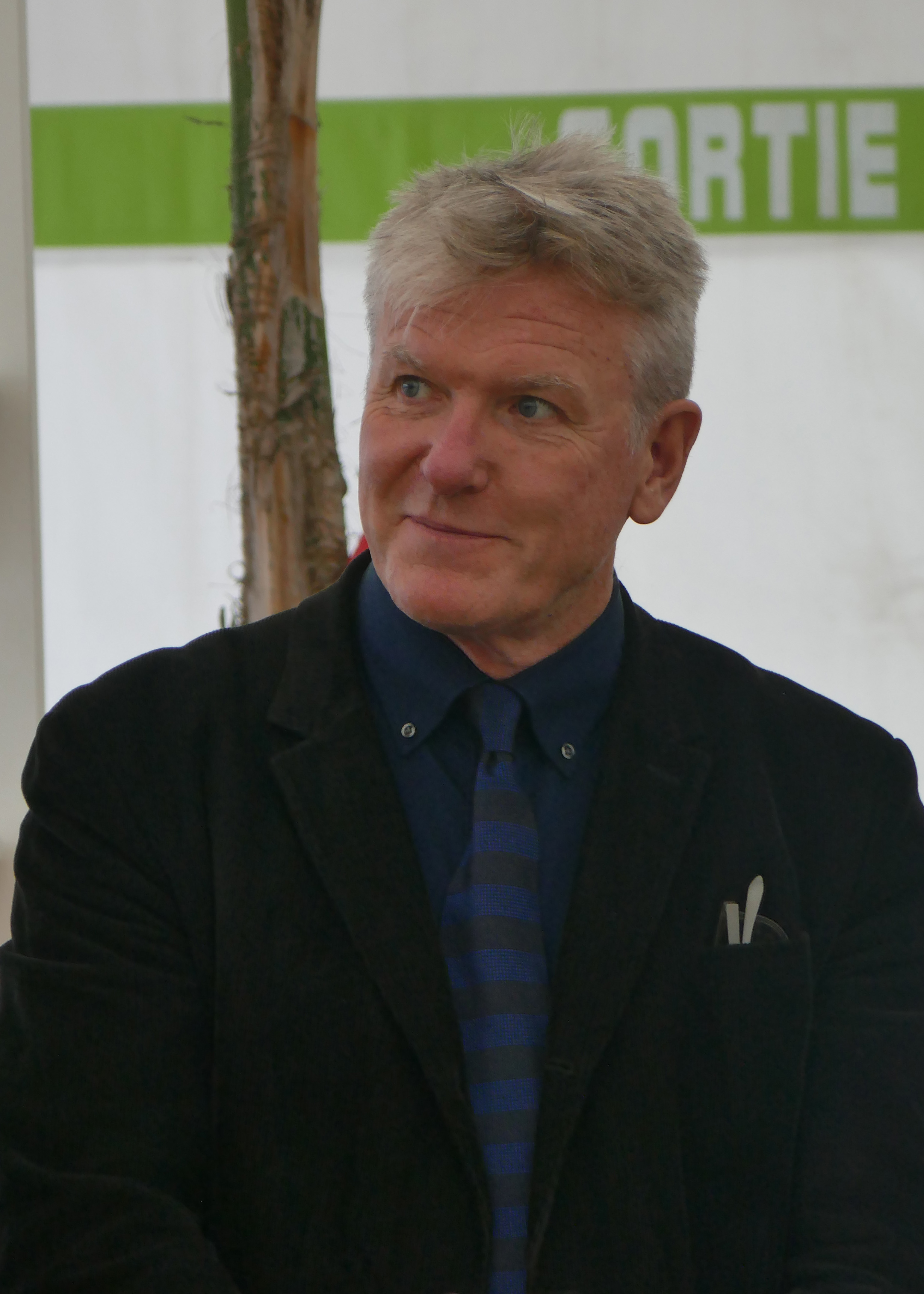 Michael Heffernan au Festival international de géographie 2019 à Saint-Dié-des-Vosges